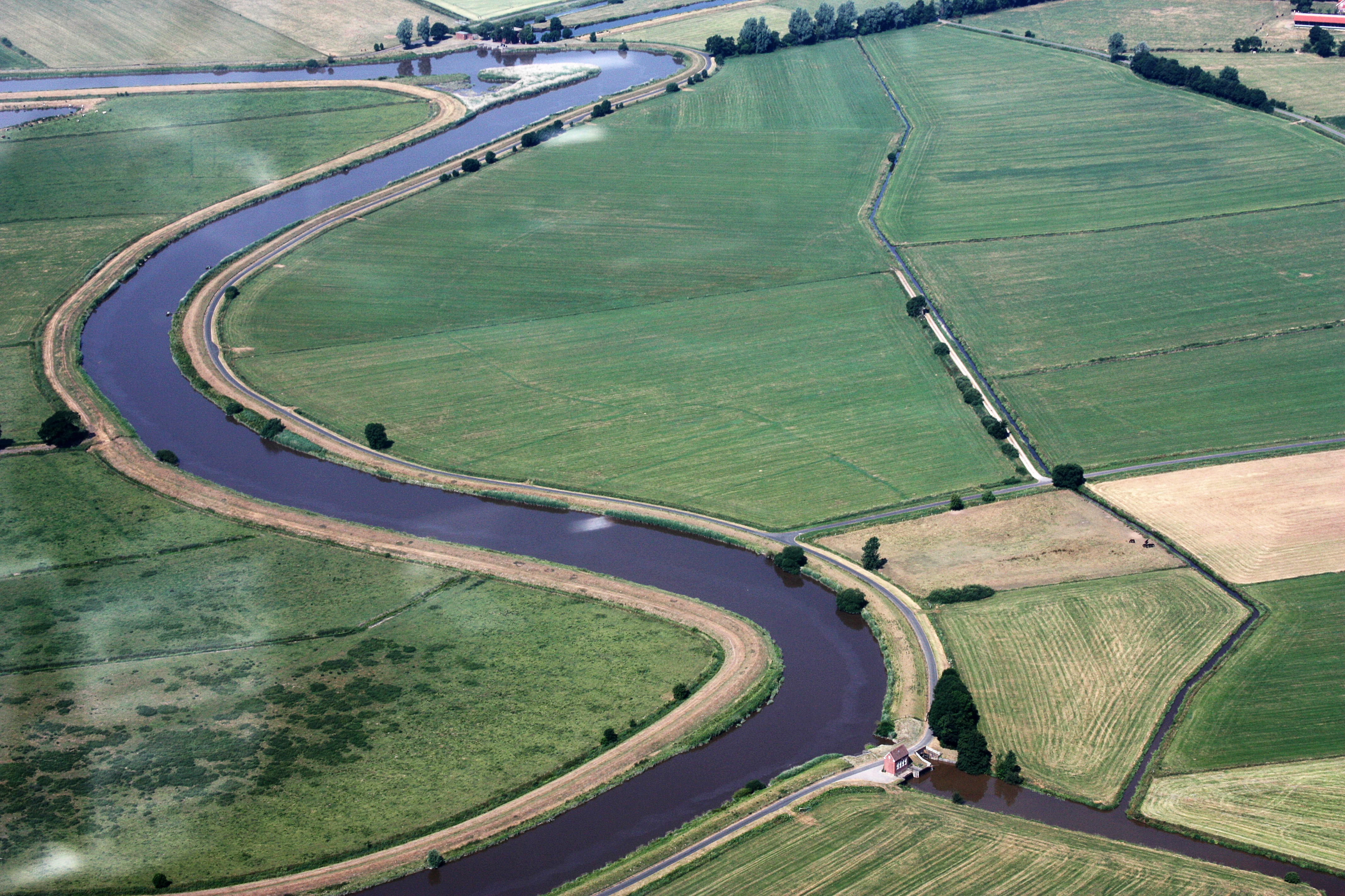 Luftaufnahme; Flug von Westerstede nach Leer; Flughöhe 1500 ft; Juli 2010; Originalfoto bearbeitet: Tonwertkorrektur und Bild geschärft mit Hochpassfilter